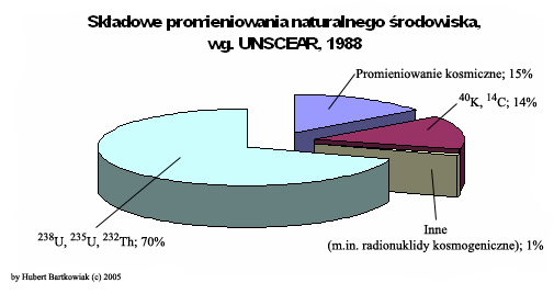 Źródła naturalnego promieniowania jonizuącego środowiska; opracowano na podstawie danych UNSCEAR z roku 1986.